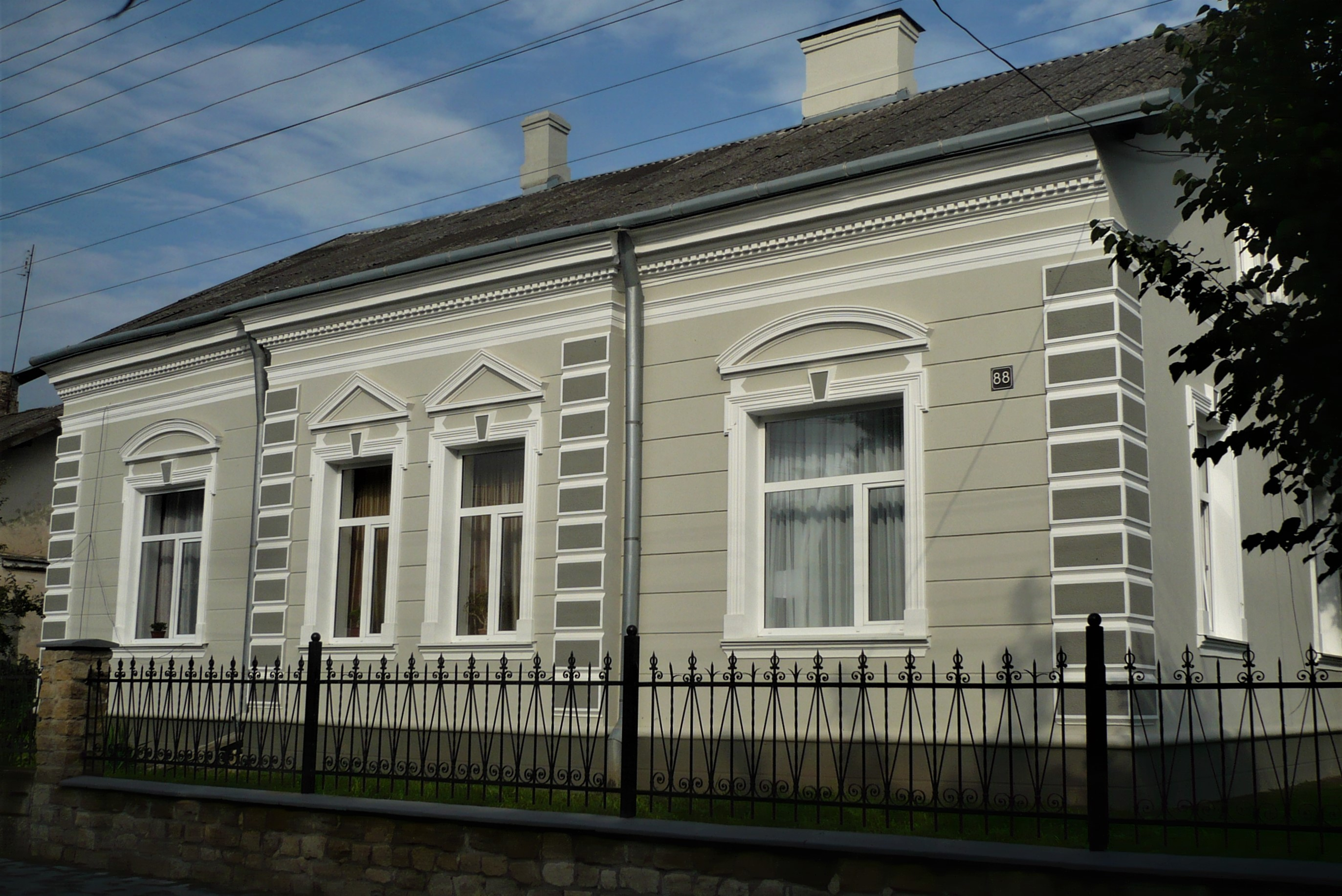 Dom w Złoczowie